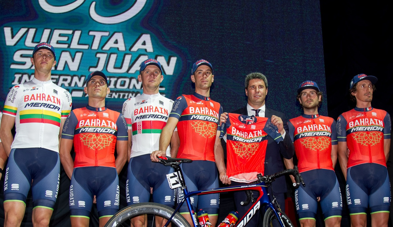 Vuelta a San Juan 2017 - Equipo Bahrein-Mérida Pro Cycling Team (Bahrein) Depicted team: Bahrain-Merida